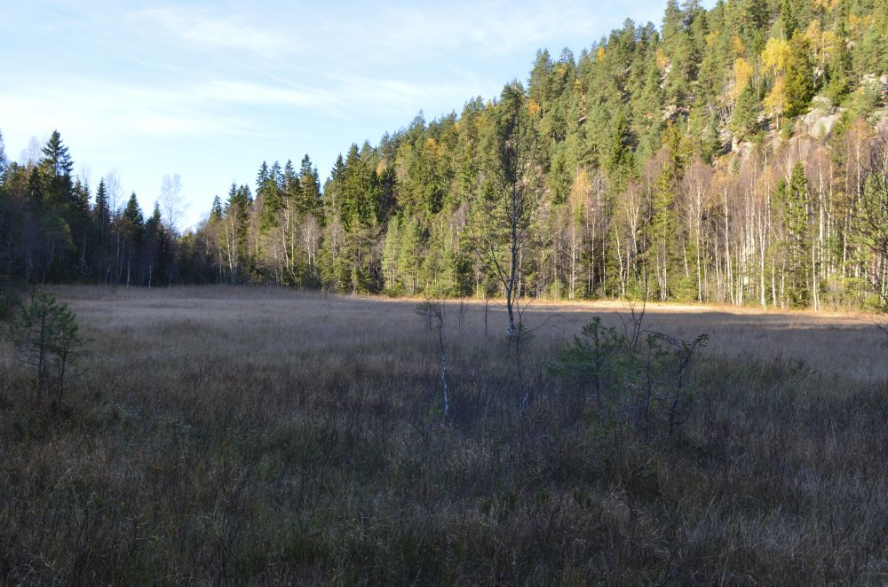 Høymyr er en middels rik jordvannsmyr.